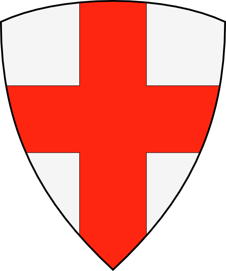 Creu de Sant Jordi